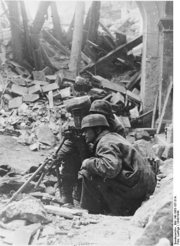 Cassino In Häusertrümmern, hinter einer letzten Mauer, versteckt, hat eine deutsche Granatwerferstellung Stellung bezogen. Unter diesen Umständen kämpfen heute die Helden von Cassino. PK.-Aufn.: Kriegsber. Luethge